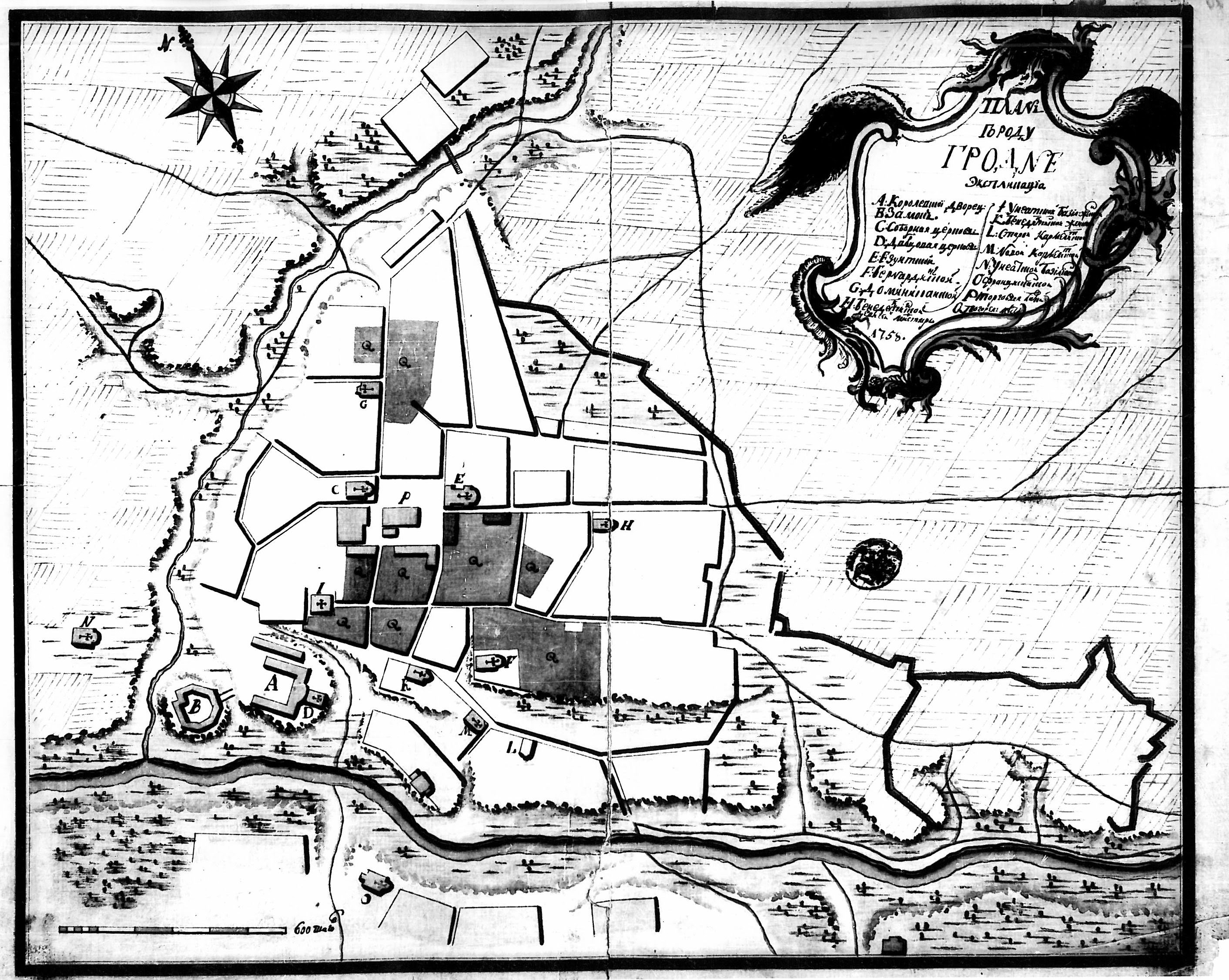 Беларуская (тарашкевіца): Горадня (Horadnia). Плян места